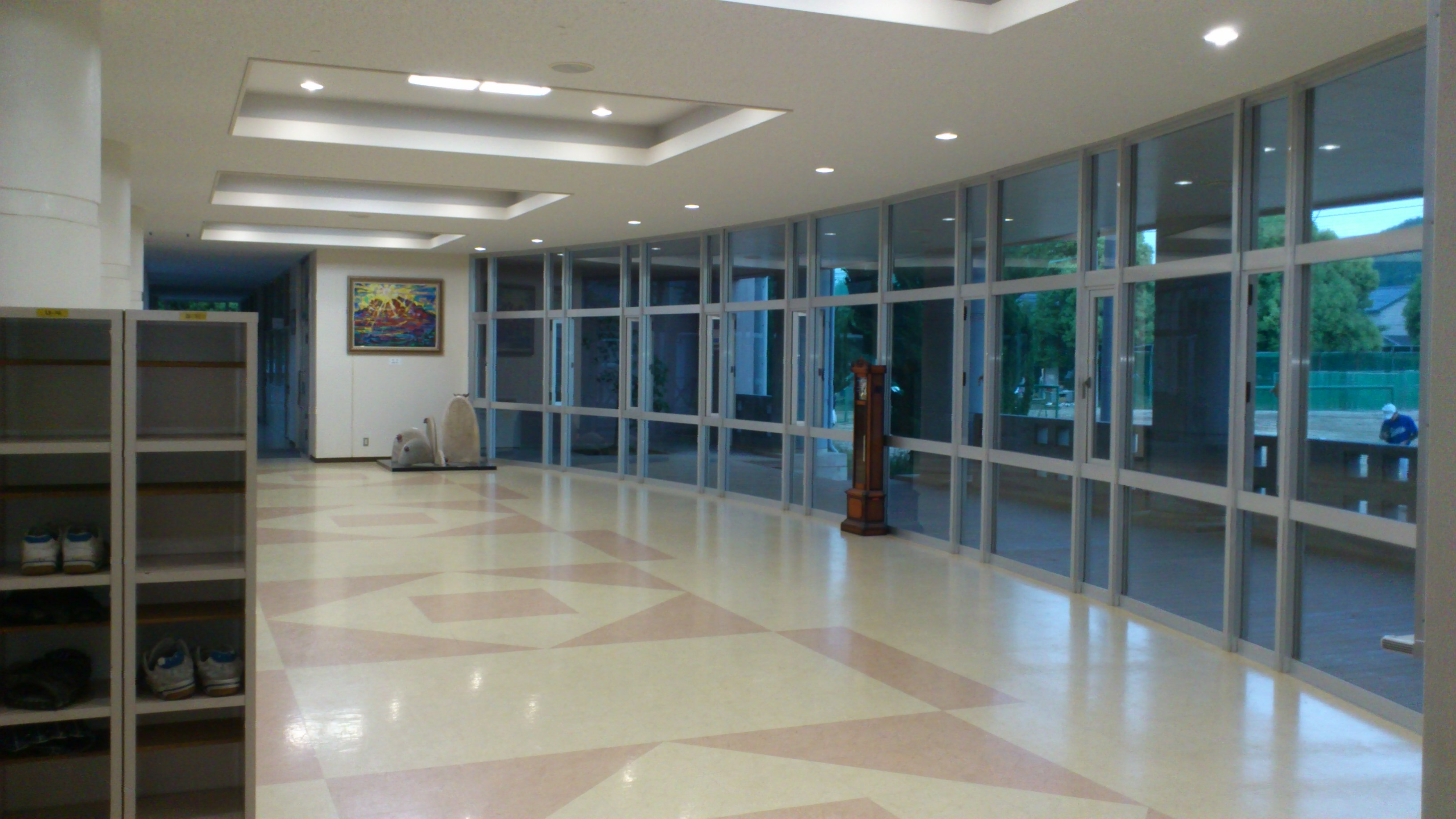 新田青雲のエントランスホール。